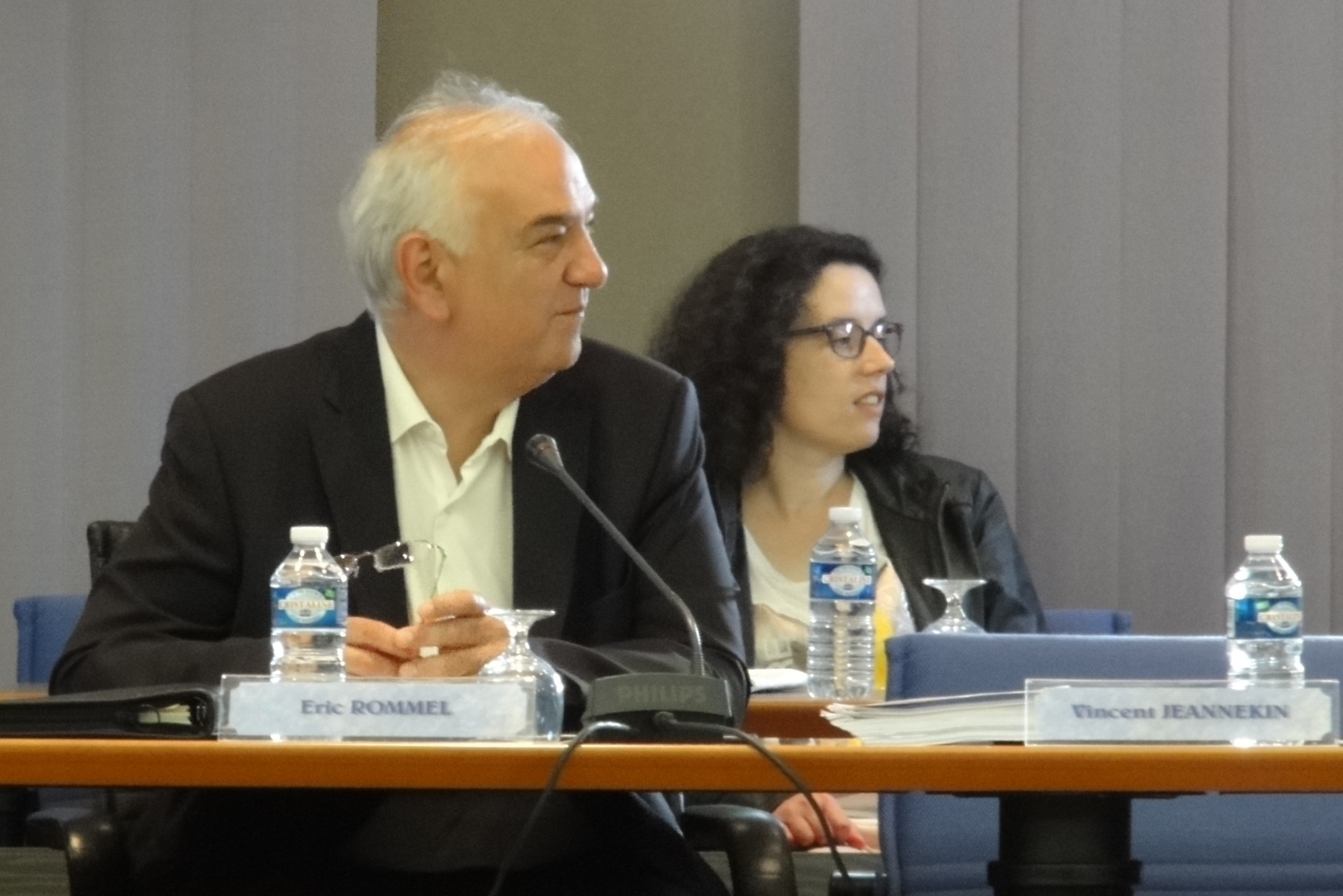 Loon-Plage (Nord) Eric Rommel et Vincent Jeanneken au conseil municipal, 25 juin 2018